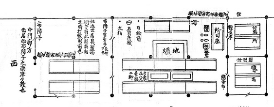 東三条殿の侍廊指図「類聚雑要抄・巻2」